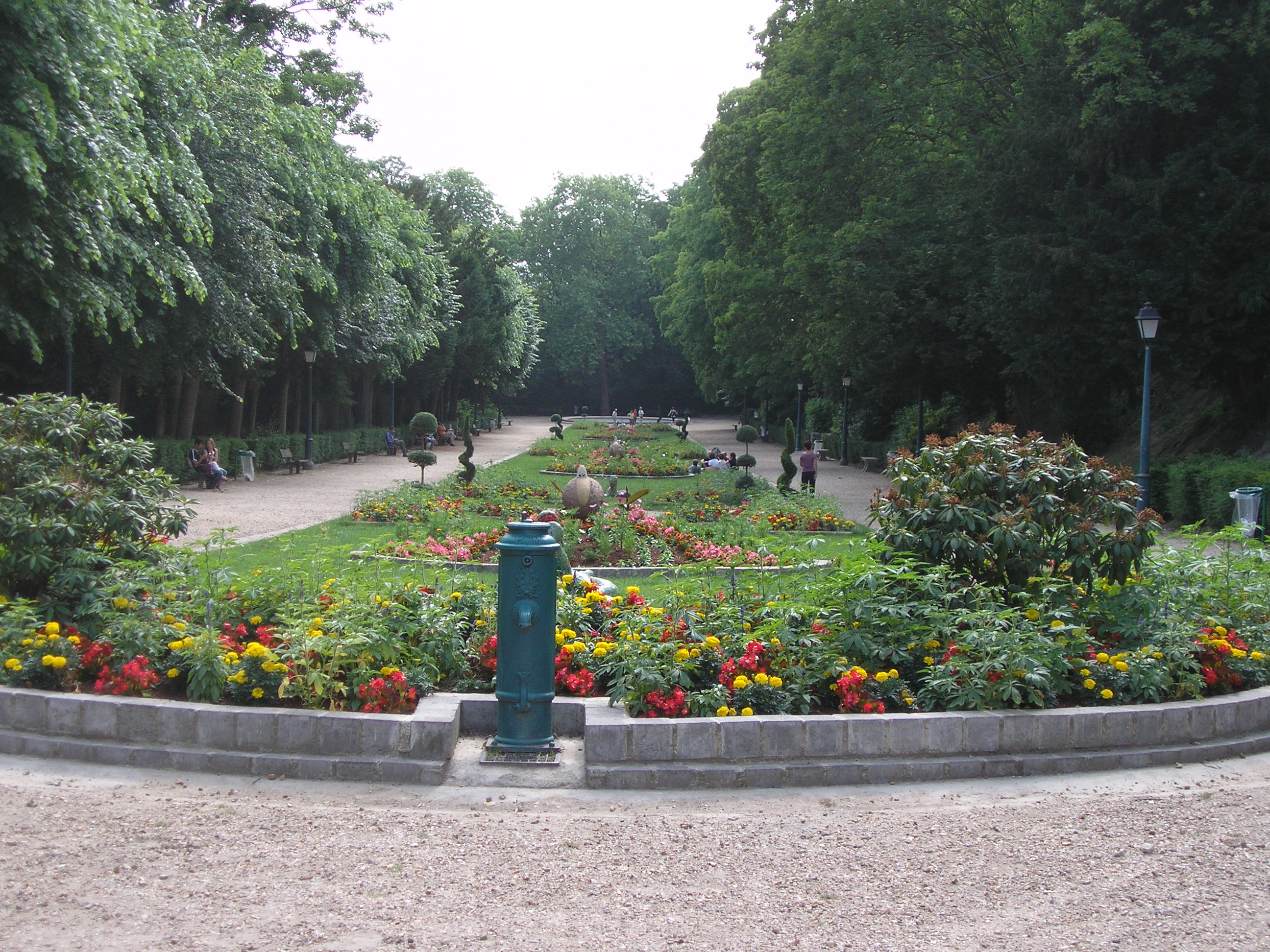 Pontoise, Jardin de la Ville Photographie Oeuvre personnelle